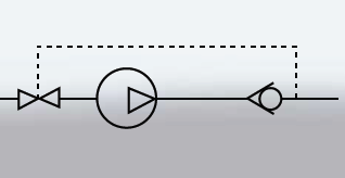 schemat obrazujący metodę regulacji sprężarki wyporowej za pomocą przepustnicy na wlocie powietrza